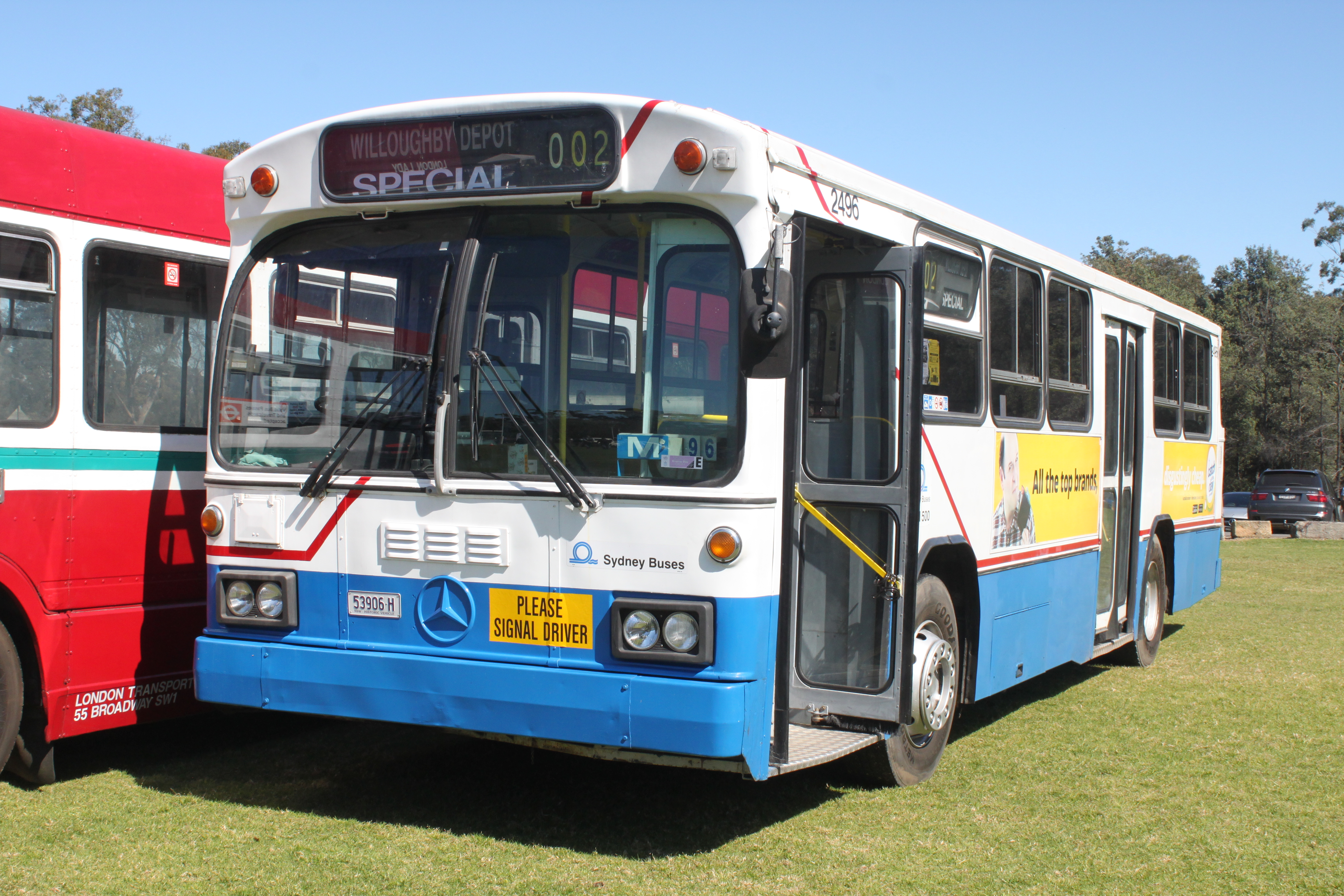 Mercedes Benz Mk2 0305 Bus - Sydney Buses